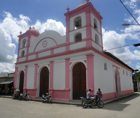 Templo Parroquial del pueblo de Panaquire, Municipio Acevedo, Estado Miranda, Venezuela.